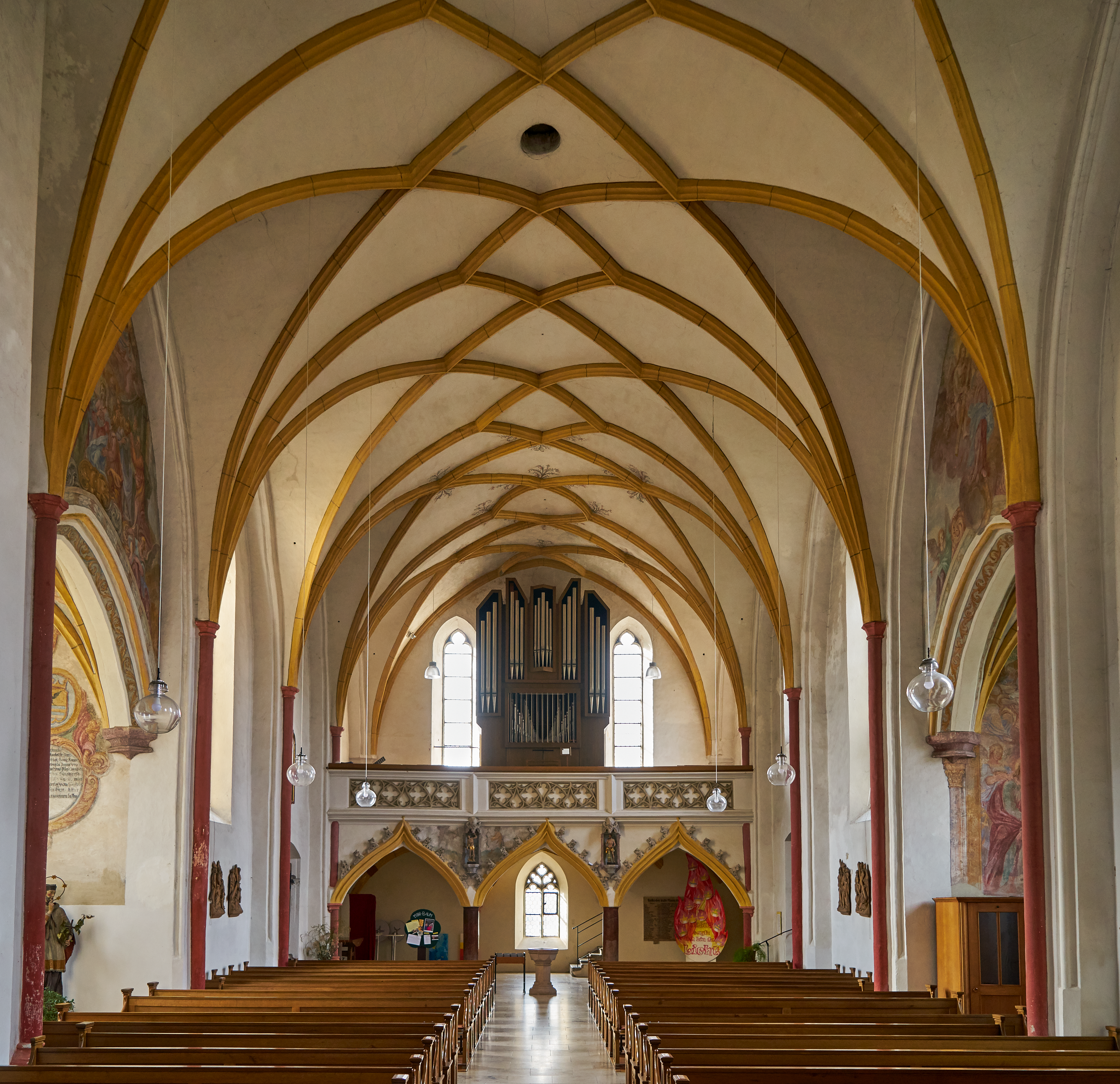 Katholische Pfarrkirche St. Petrus, Hartkirchen.Blick in das Langhaus zur Empore mir Orgel und Netzgewölbe.